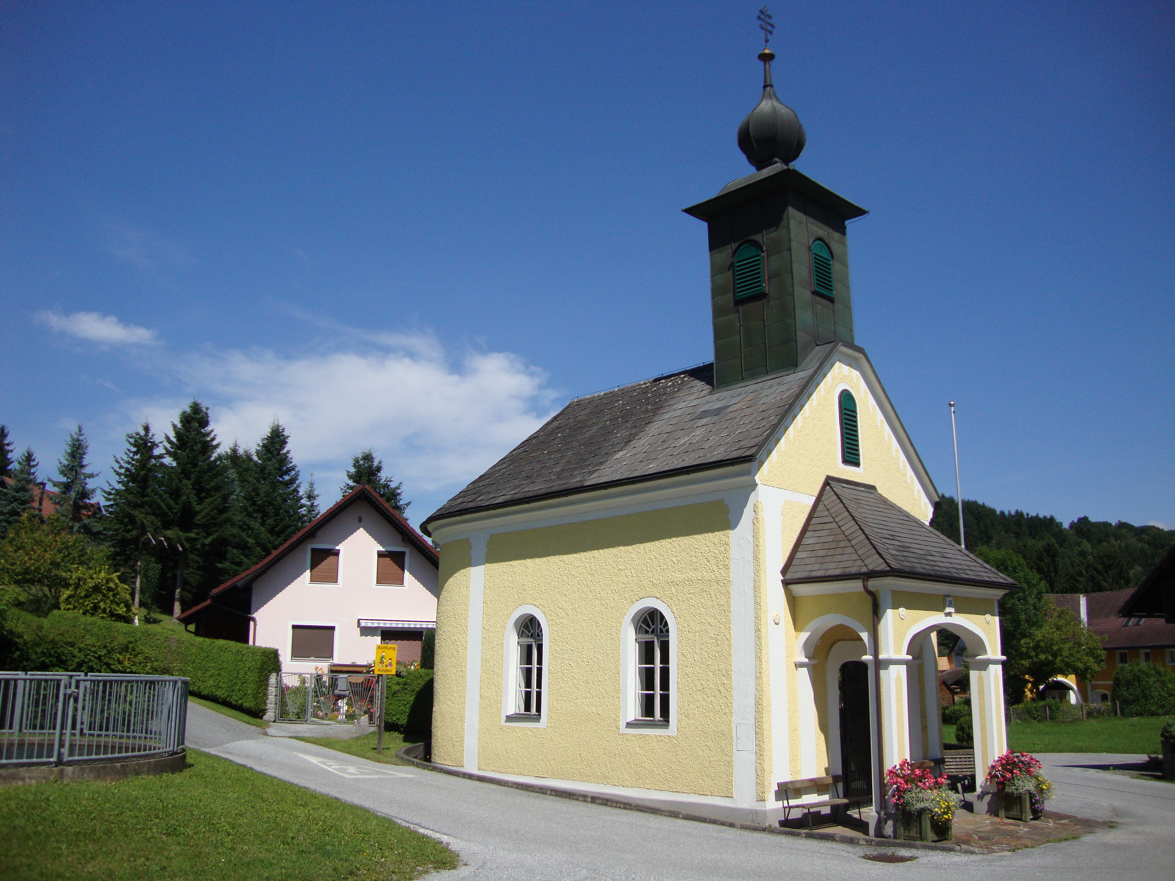 Ortskapelle, Messkapelle